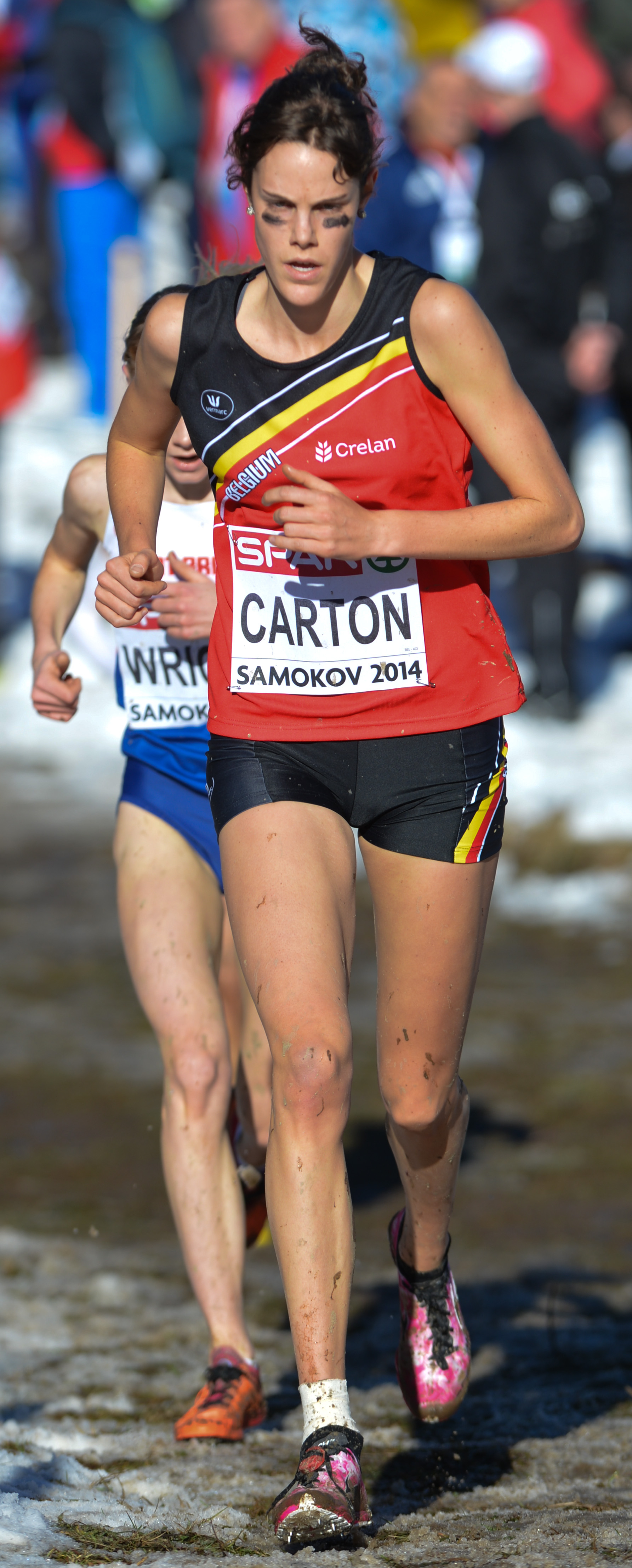 Louise Carton in actie tijdens het EK U23 Cross in 2014.